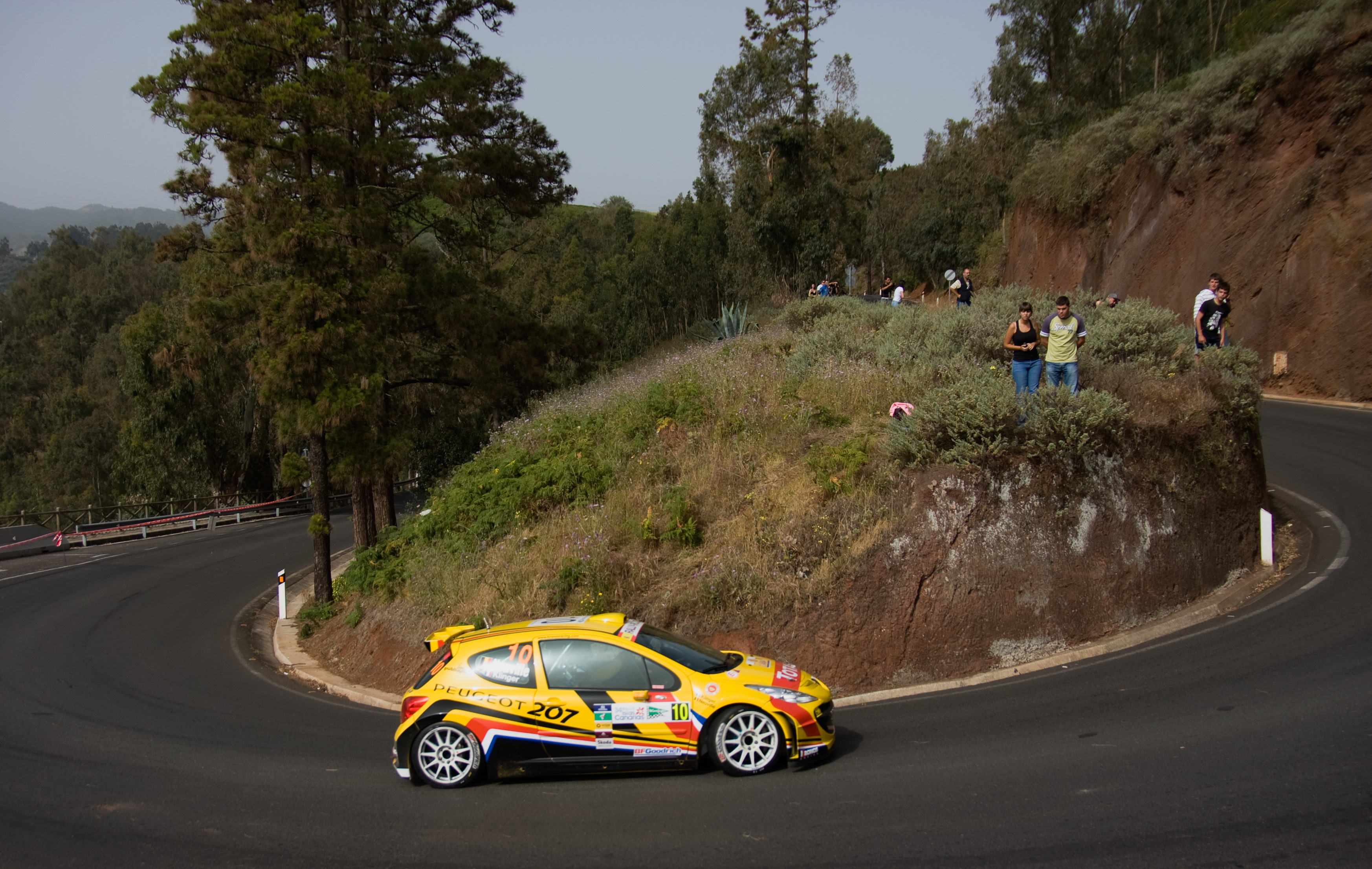 Thierry Neuville - podczas 34 Rajdu Wysp Kanaryjskich w 2010 roku